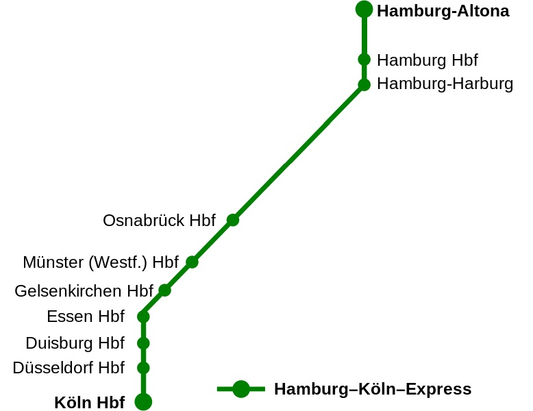 Strecke des Hamburg-Köln-Express